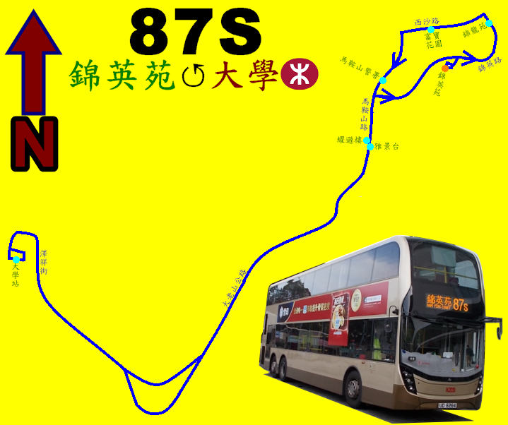 中文（香港）: 九巴87S線(早上班次)的走線圖